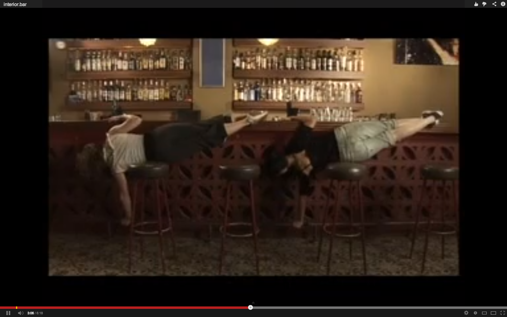 הוידאודאנס פנים. בר שיצרה וביימה עמנואלה עמיחי